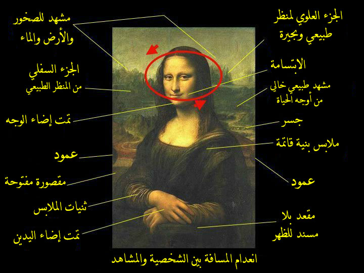 صورة توضيحية للعناصر الفنية للوحة الموناليزا